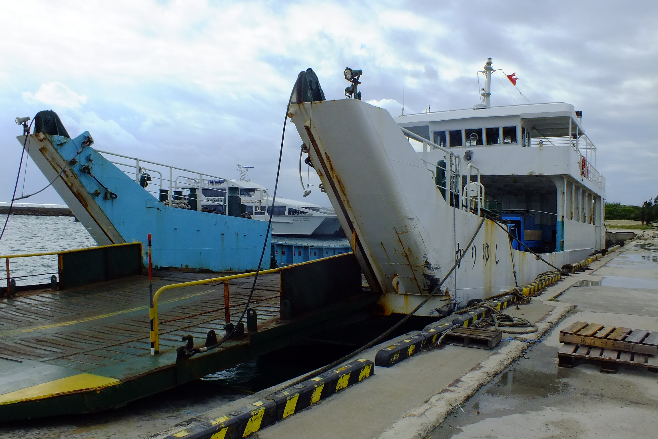 2017-01-26 かりゆし（貨客船） 全長29.20m 全幅8.00m 最大速力12ノット 旅客定員13名 プロペラ×2基 八重山観光フェリー貨客船「かりゆし」 西表島大原港